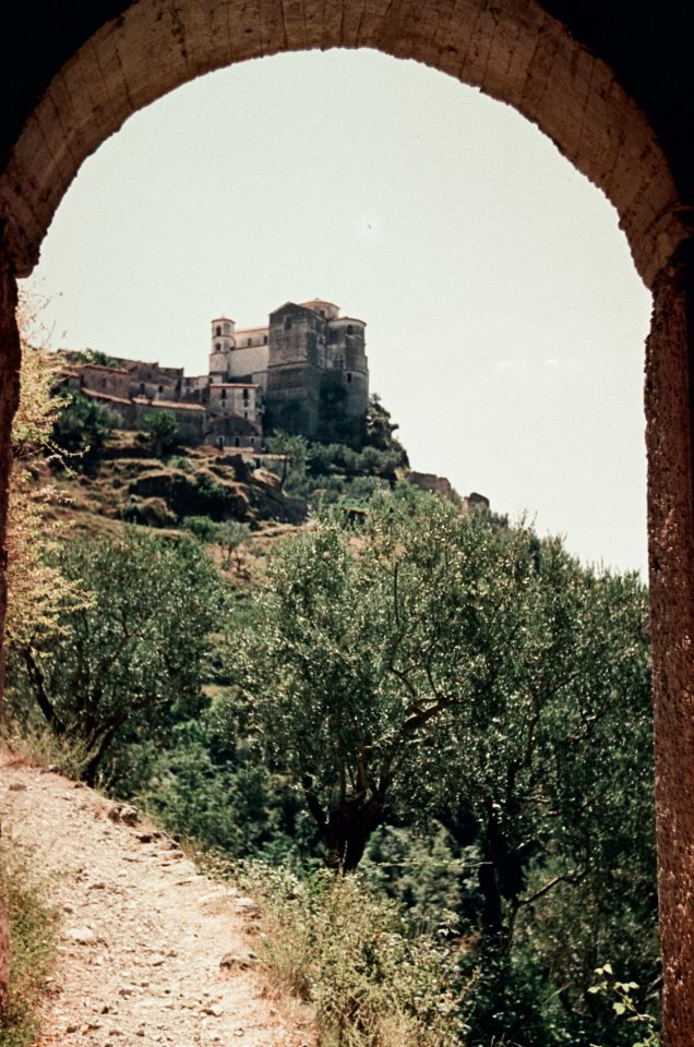 La Chiesa di S. Maria del Poggio vista da sotto il portico della Chiesetta della Madonna del Popolo a Rivello.